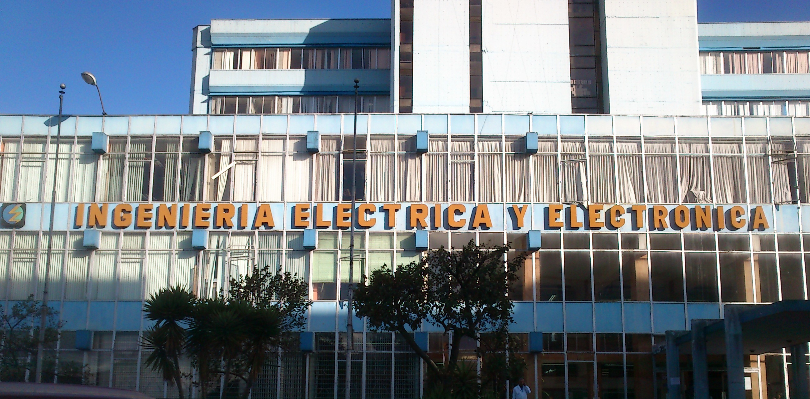 Facultad de Ingeniería Eléctrica y Electrónica de la Escuela Politécnica Nacional